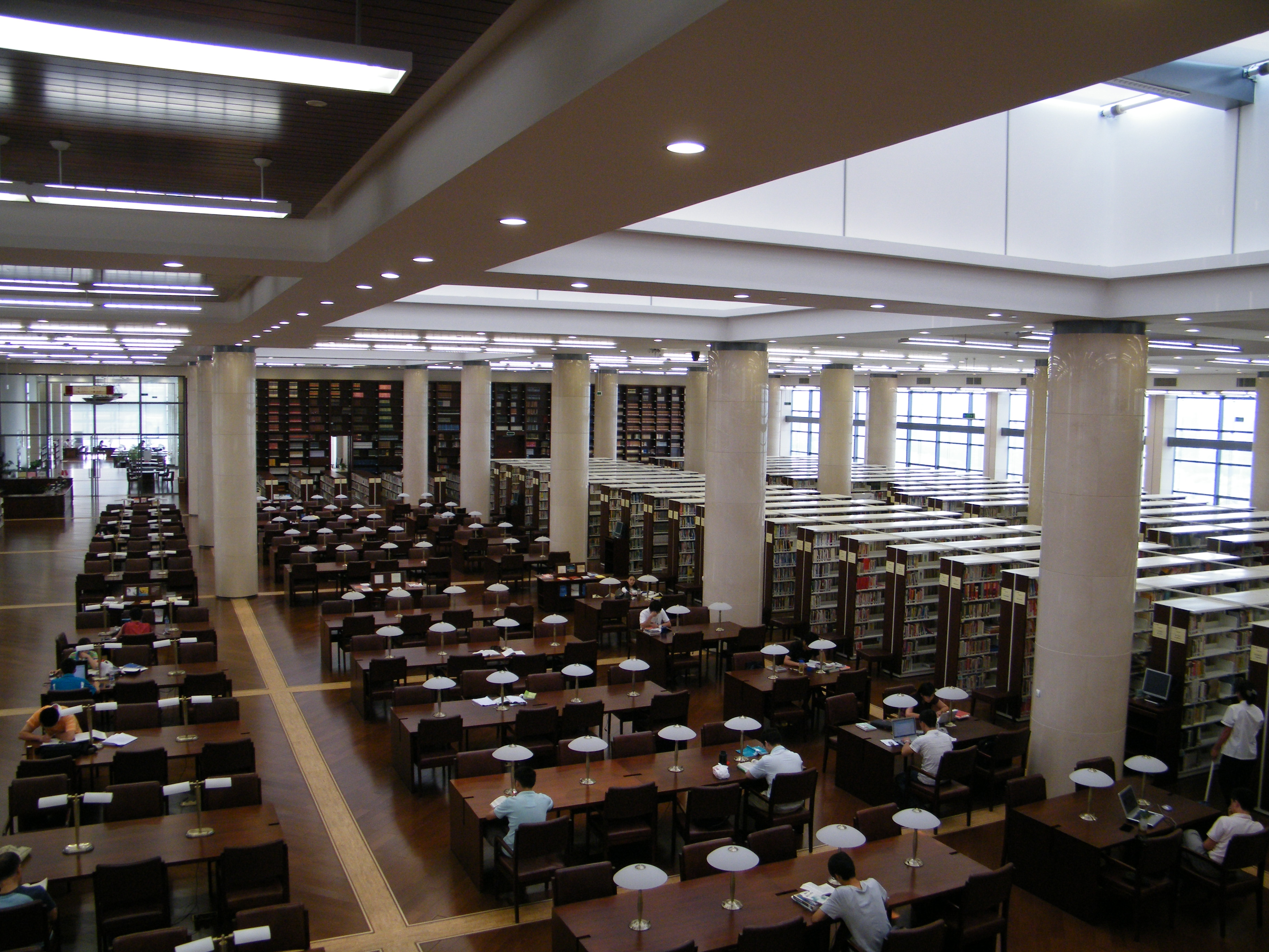 中国大陆浙江杭州钱江新城市民中心杭州图书馆三楼自习阅读大厅 中文（中国大陆）: 中国大陆浙江杭州钱江新城市民中心杭州图书馆三楼自习阅读大厅